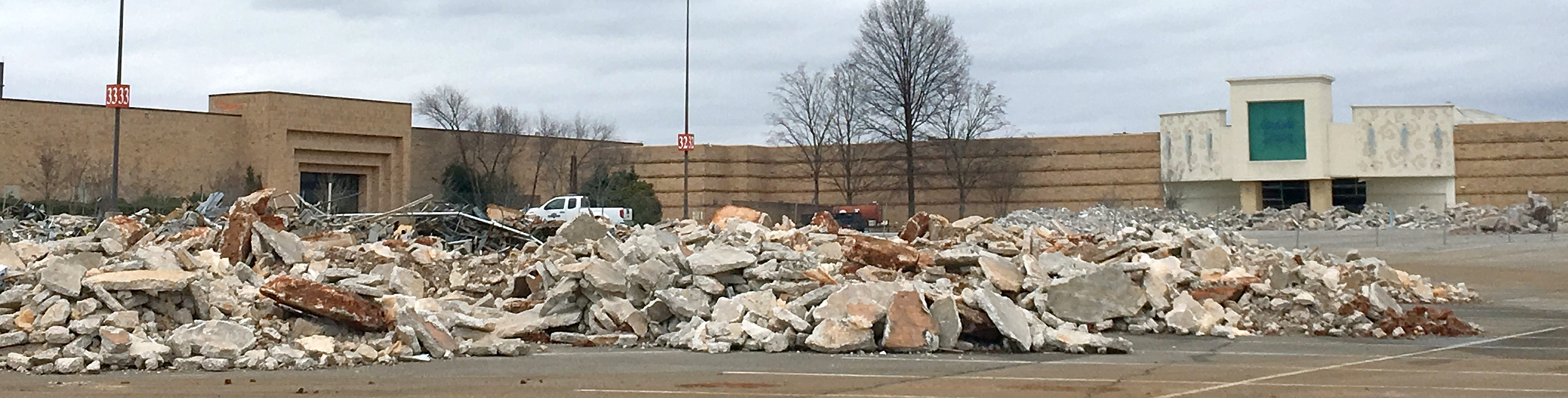 Madison Square Mall, Huntsville, Alabama.